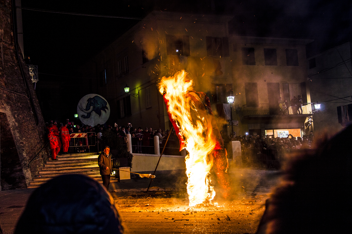 Rogo di Re Giocondo Carnevale di Foiano della Chiana 2015